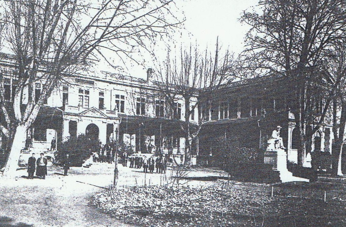 Ancienne École normale de 1886 sise intramuros au n° 33 de la rue Louis Pasteur (ex rue de l'hôpital) à Avignon (Vaucluse, France). Cour d'honneur et statue du célèbre entomologiste Jean-Henri Fabre (ancien normalien d'Avignon), façade principale et aile au levant.